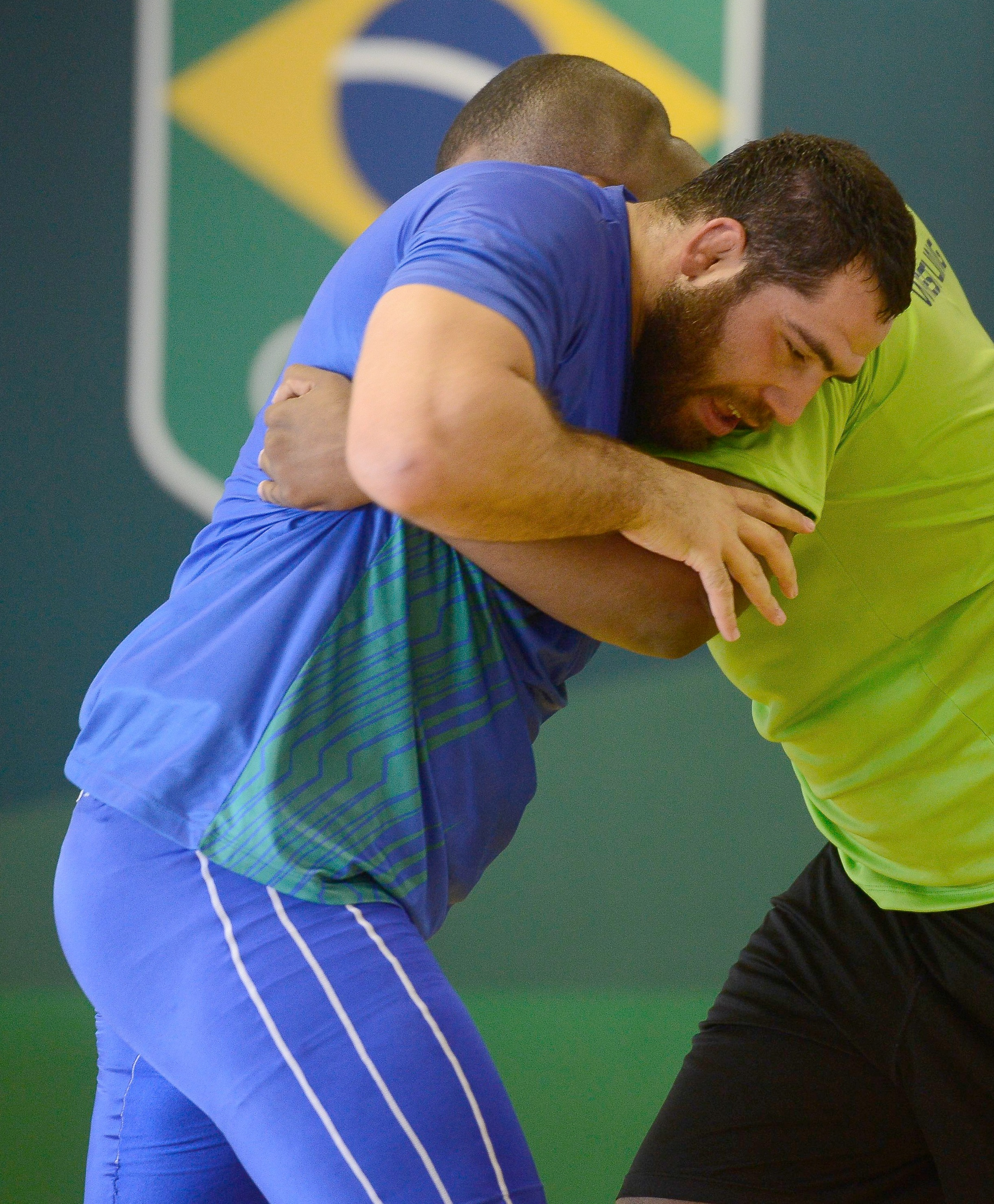 Rio de Janeiro - O atleta de luta olímpica Eduard Soghomonyan (de azul) treina para as Olimpíadas Rio 2016 na casa do Time Brasil, na Urca (Tomaz Silva/Agência Brasil)